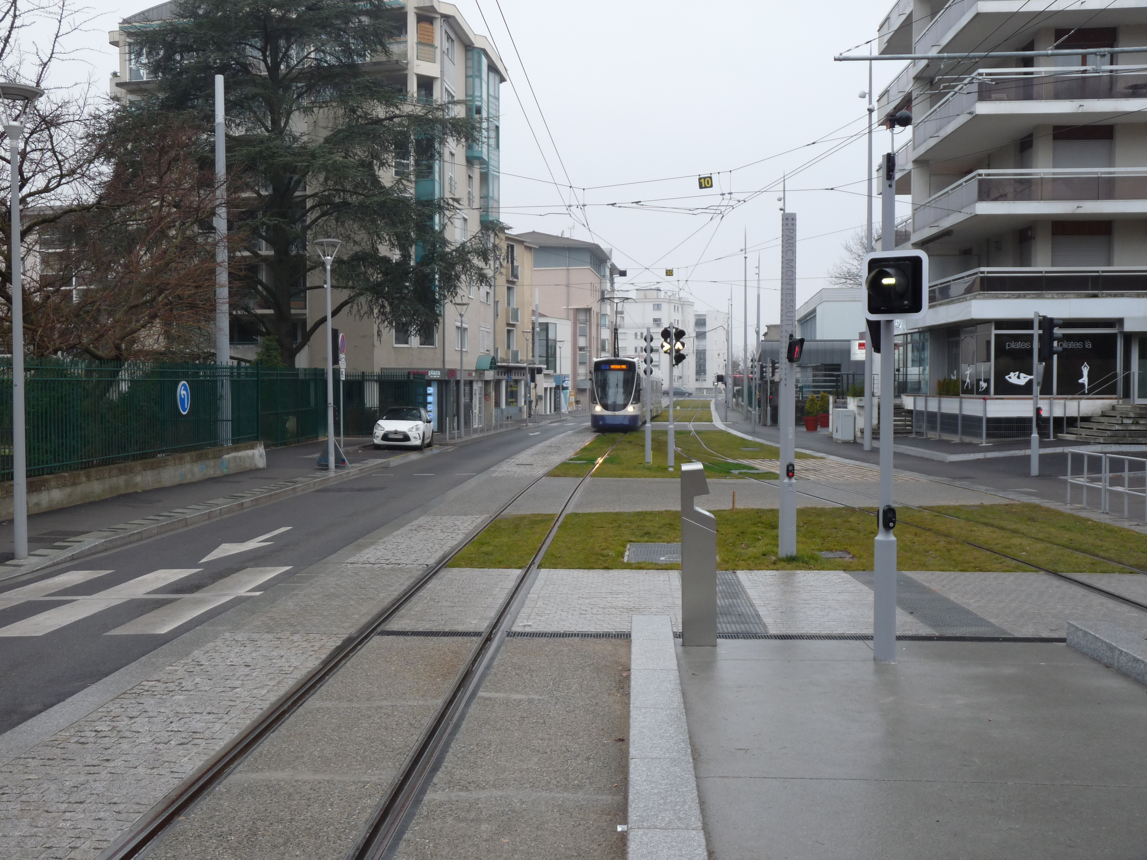 Aankomende tram bij Annemasse eindpunt